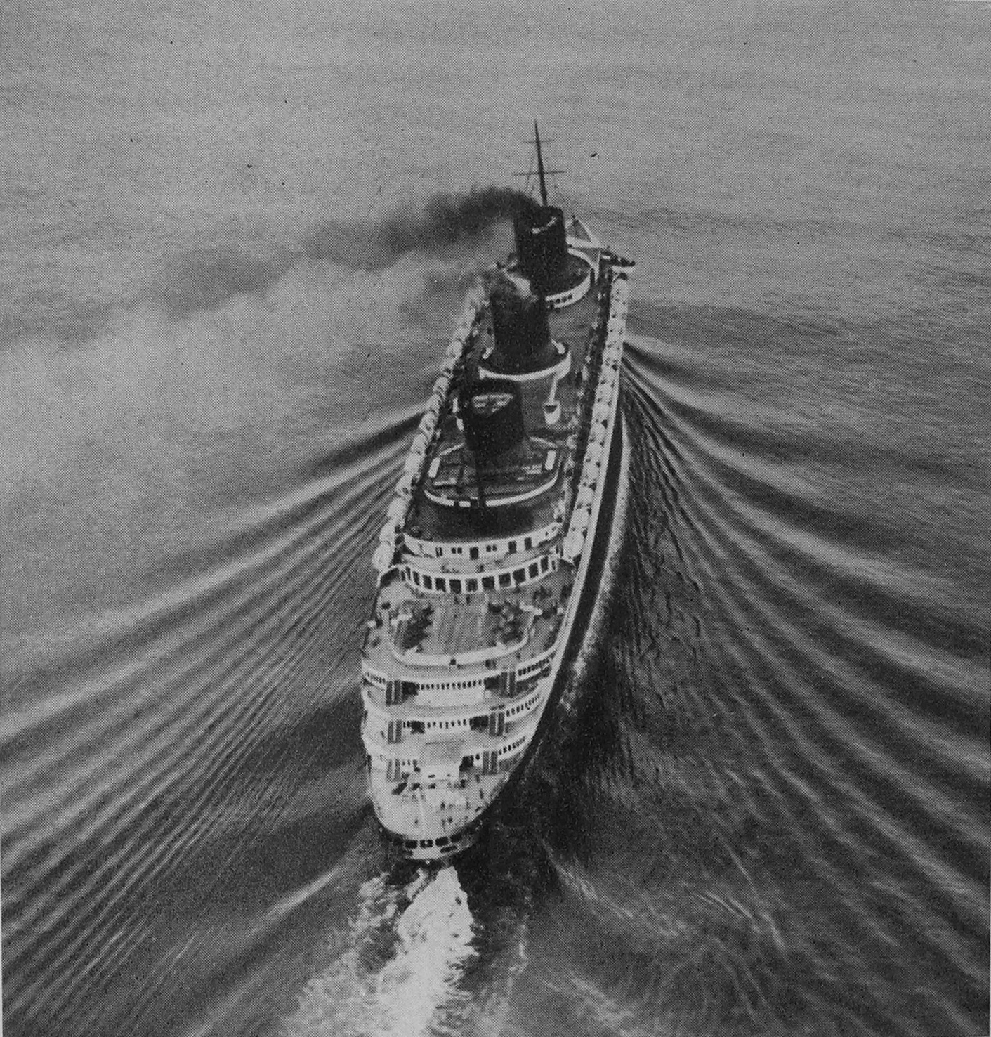 Luftaufnahme der Normandie in der Fachzeitschrift "Werft*Reederei*Hafen"